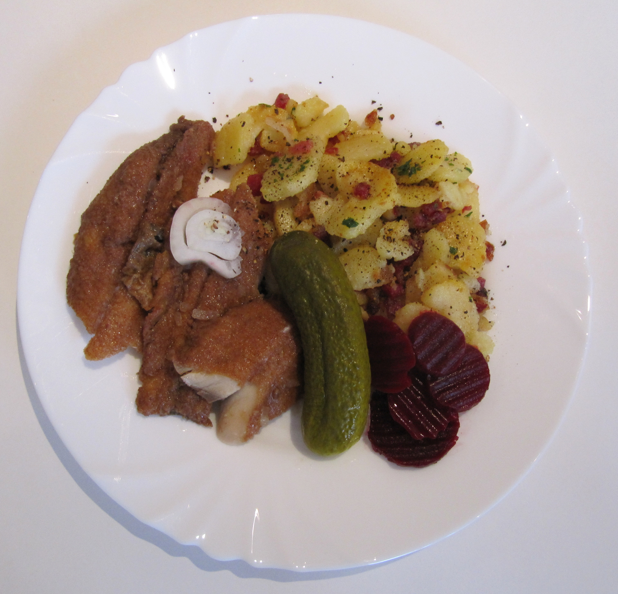 GT_Brathering_1